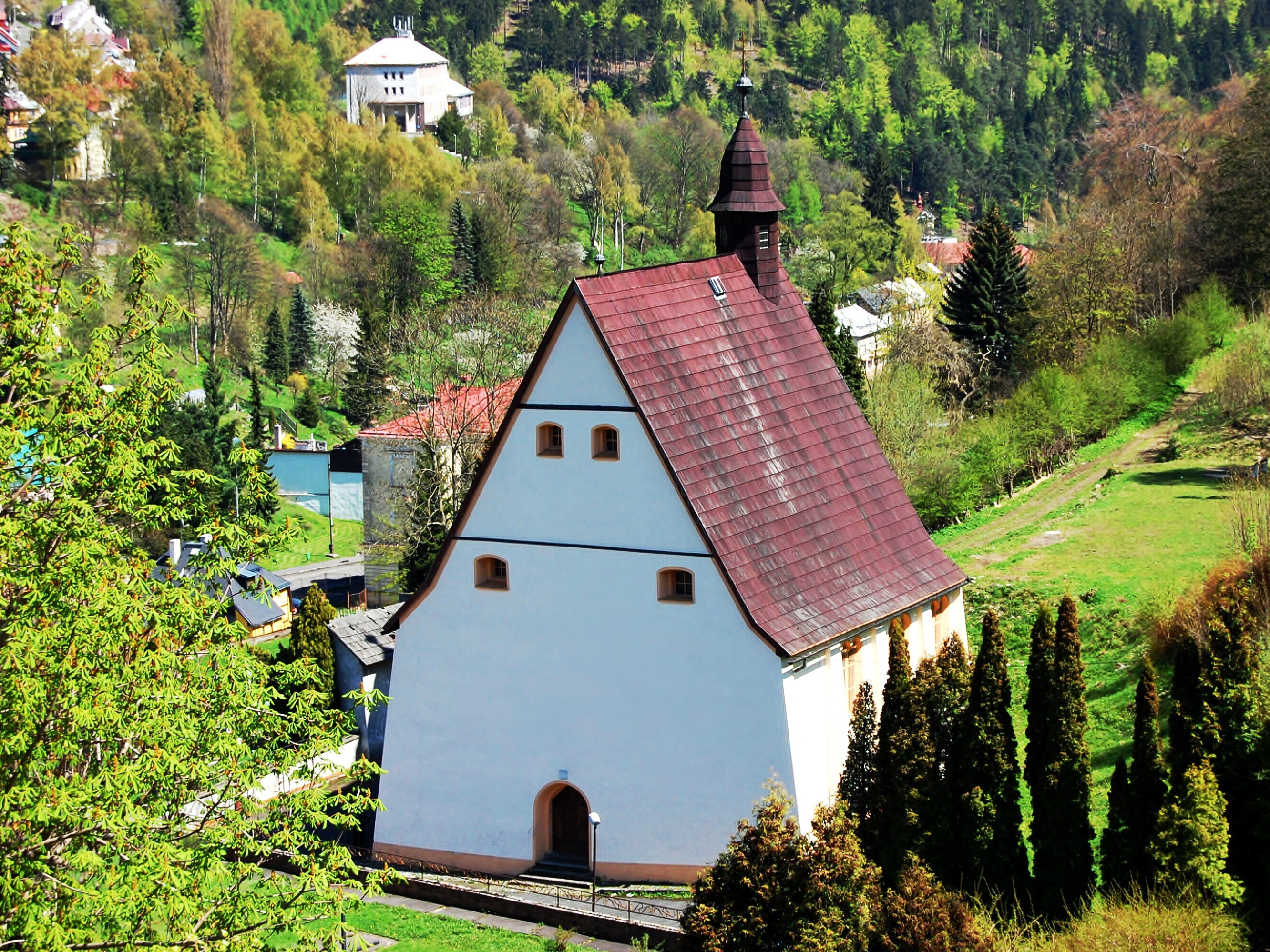 Kostel Všech svatých (Jáchymov), Jáchymov